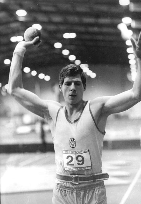 Jörg Schäperkötter ADN-ZB Weisflog 29.1.83 Cottbus: Titel an Jörg Schäperkötter- Neuer DDR-Hallenmeister im Siebenkampf der Männer wurde in Senftenberg Jörg Schäperkötter vom ASK Potsdam mit 5598 Punkten. Beim Kugelstoßen kam er auf 15,39 Meter.